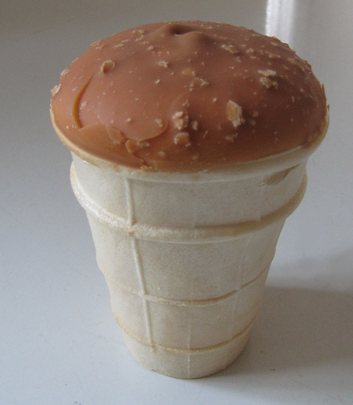 Karamell-Plombir